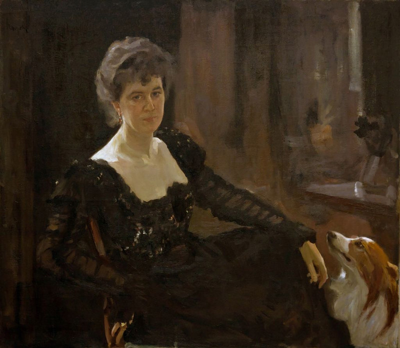 «… Серов понял мой характер, придал мне непринужденную позу, очень мне свойственную, и казалось, удача будет полная. Однажды во время сеанса влетел Дягилев и с места в карьер напал на Серова, стал смеяться, что тот пишет даму в декольте при дневном освещении. Это было до того неожиданно и с первого взгляда так смело, что Серов смутился и, поддавшись его влиянию, тут же зажег электрическую лампу с желтым абажуром. Эта перемена освещения дала мне желтый рефлекс на лице и совершенно убила удачный колорит портрета. Но, несмотря на желтизну лица, мне все-таки очень нравился этот портрет, и, когда он был готов (в 1898 году), я повесила его в кабинете мужа в его отсутствие. Вернувшись и увидав его, муж пришел в такое негодование, что приказал вынести его вон и сделал мне снова самую тяжелую сцену, говоря, что предпочитает видеть на своих стенах олеографии, нежели такие карикатуры. Когда Серов, увидав князя и не дождавшись от него ни одного любезного слова, сам вызвал его на разговор о портрете, князь очень сухо ответил ему: — Позвольте мне не высказываться. Когда человек молчит, это значит, что он не хочет сказать чего-нибудь неприятного. С тех пор Серов сделался моим отъявленным врагом, несмотря на то, что я лично всегда ценила его талант и приветливо встречала его. Он никогда не мог простить мужу его слов и совсем не по-рыцарски вымещал их на мне…»